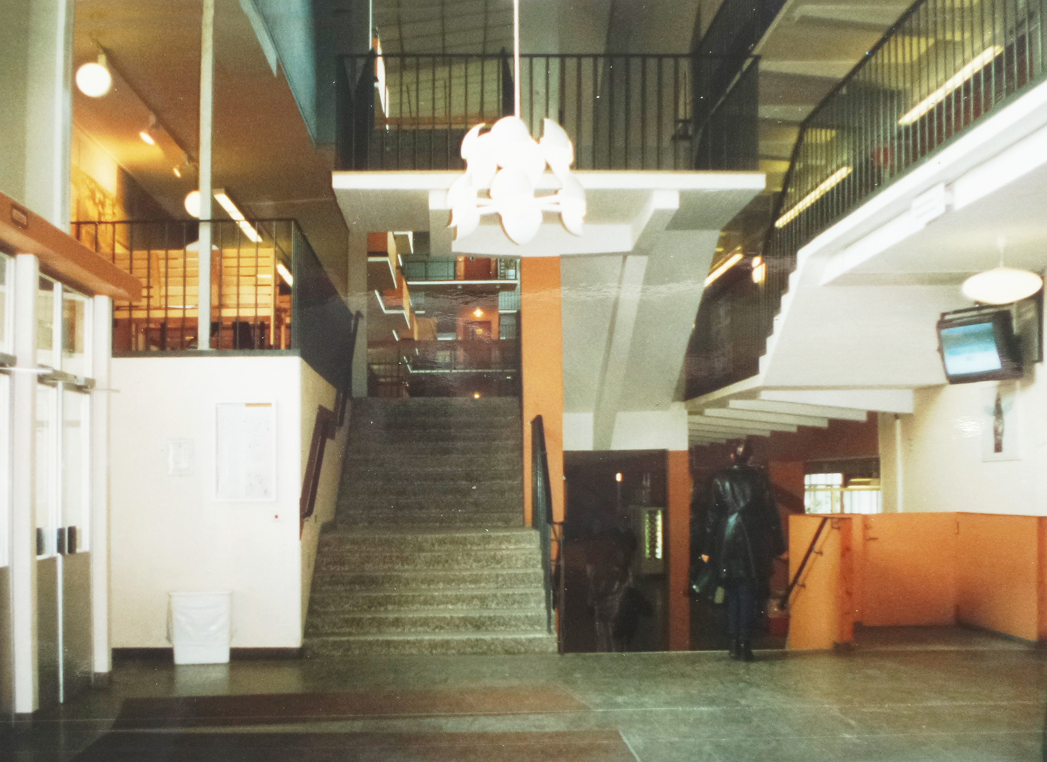 Kärrtorps gymnasium, ljushallen